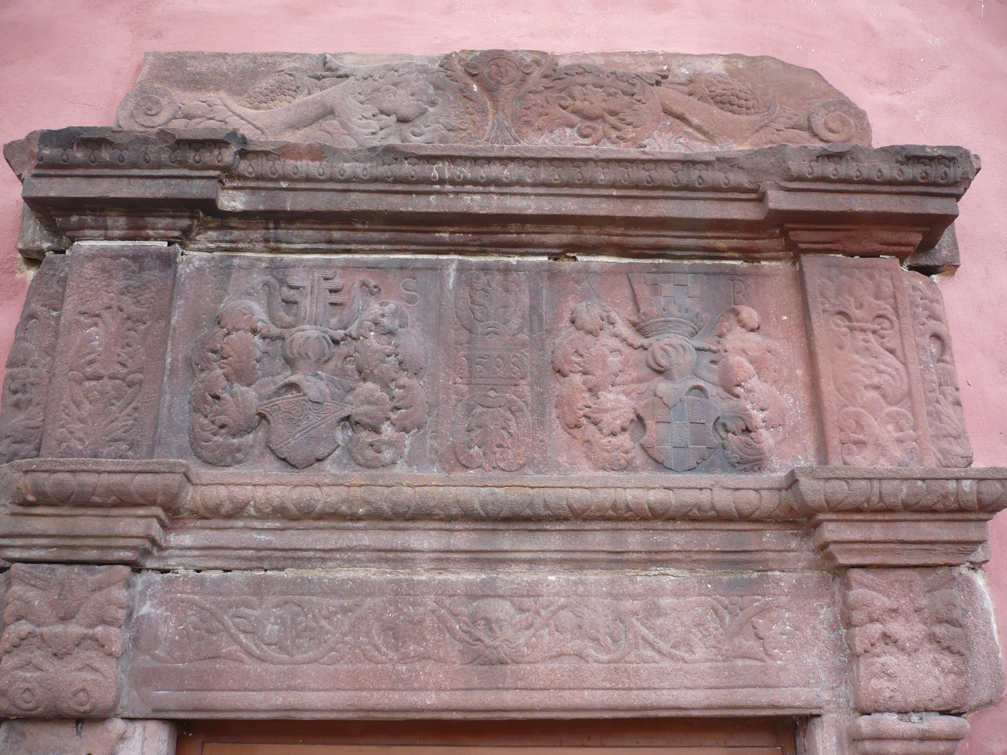 Nowa Ruda, ul. Kościelna 30 - Dwór Górny, obecnie hotel, XVII, XIX w. (zabytek nr A/940/652/WŁ z 25.05.1977)